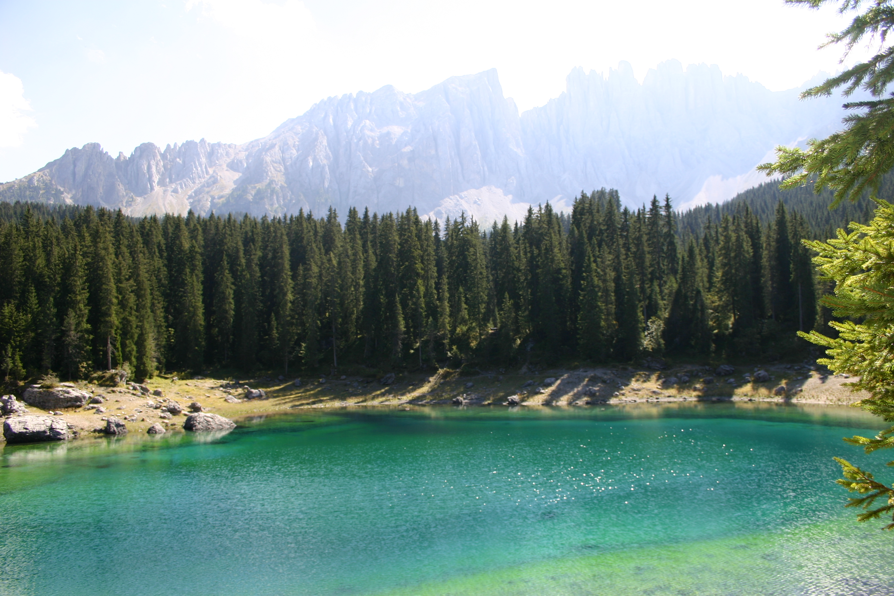 Blick auf den Karersee, im Hintergrund der Latemar (other)